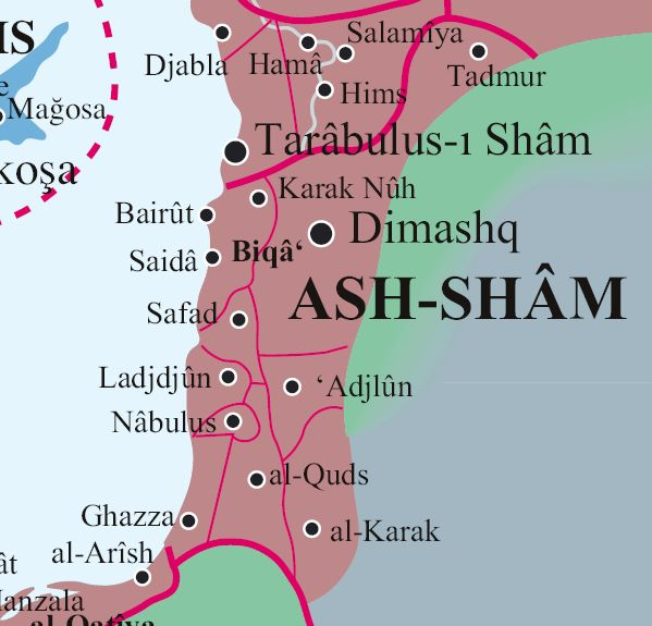 Ottoman syriabeglerbeicSHAM